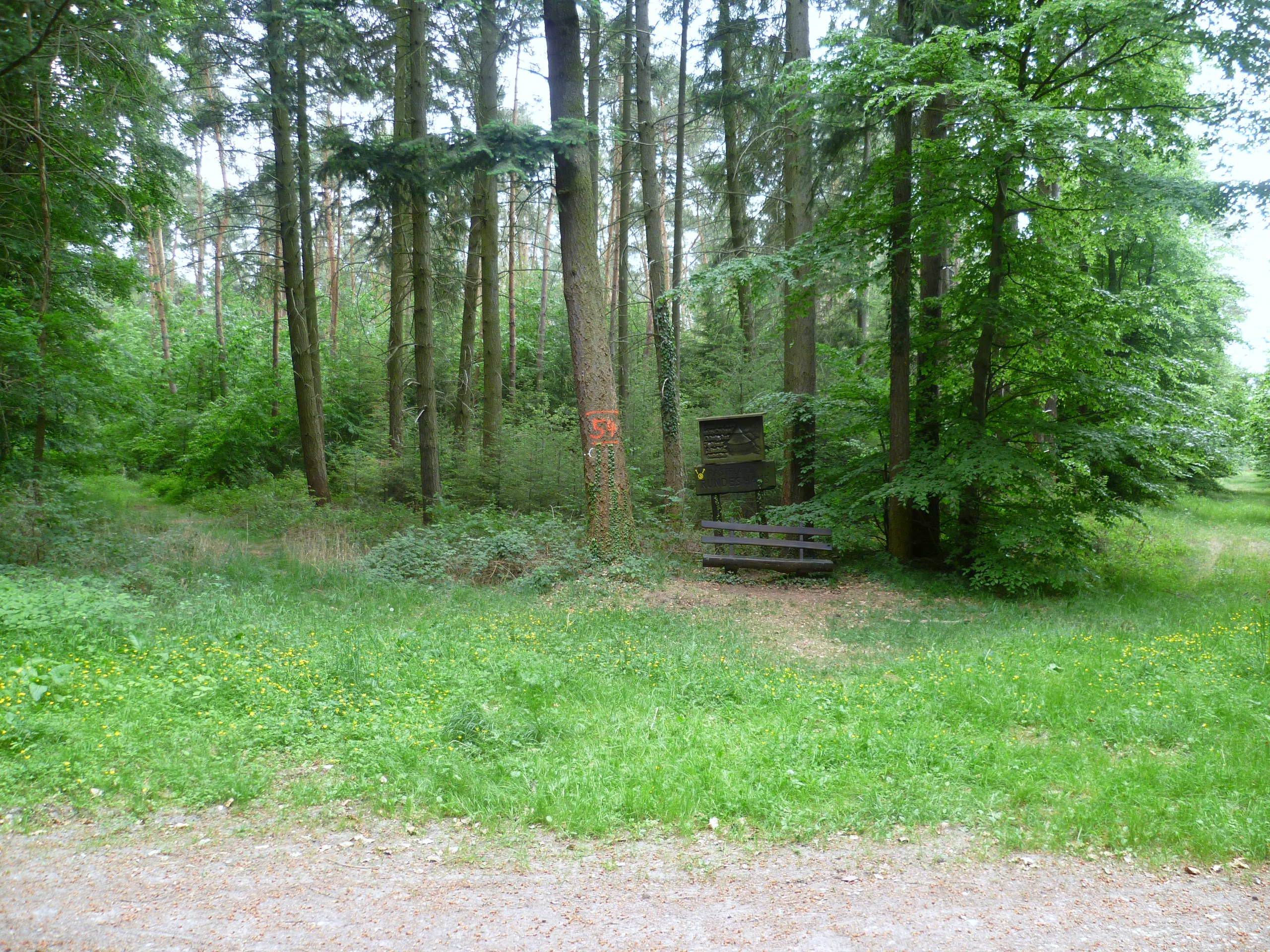 Der heutige Rastplatz Rundes Haus, an dem das Jagdschloss Jägersburg (erbaut 1609) stand. Ort: Jägersburger Wald bei Einhausen (Hessen). Rechts und links von der Ruhebank sind V-förmig zwei der insgesamt sechs Wege zu erkennen, die zu dem ehemaligen Jagdhaus hinführten.